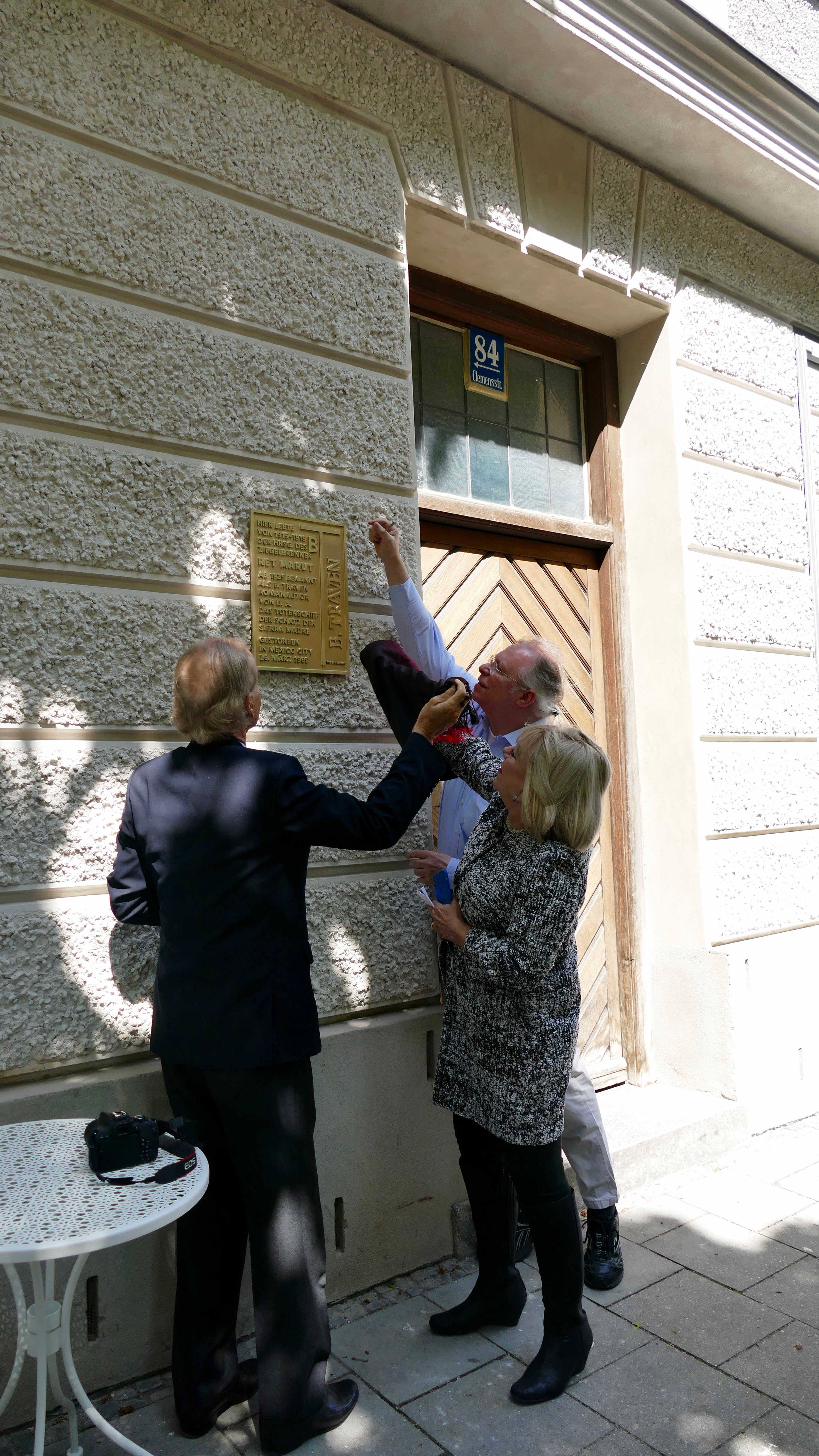 Enthüllung einer Gedenktafel für B.Traven (Ret Marut) am Wohnhaus Clemensstraße 84 in München, wo der Schriftsteller von 1915-1919 lebte. Aus Mexiko City angereist: B. Travens Stieftochter Malú Montes de Oca und ihr Ehemann Timothy Heyman. Dahinter: der Vorsitzende der Internationalen B. Traven Gesellschaft e. V. Ralf G. Landmesser.